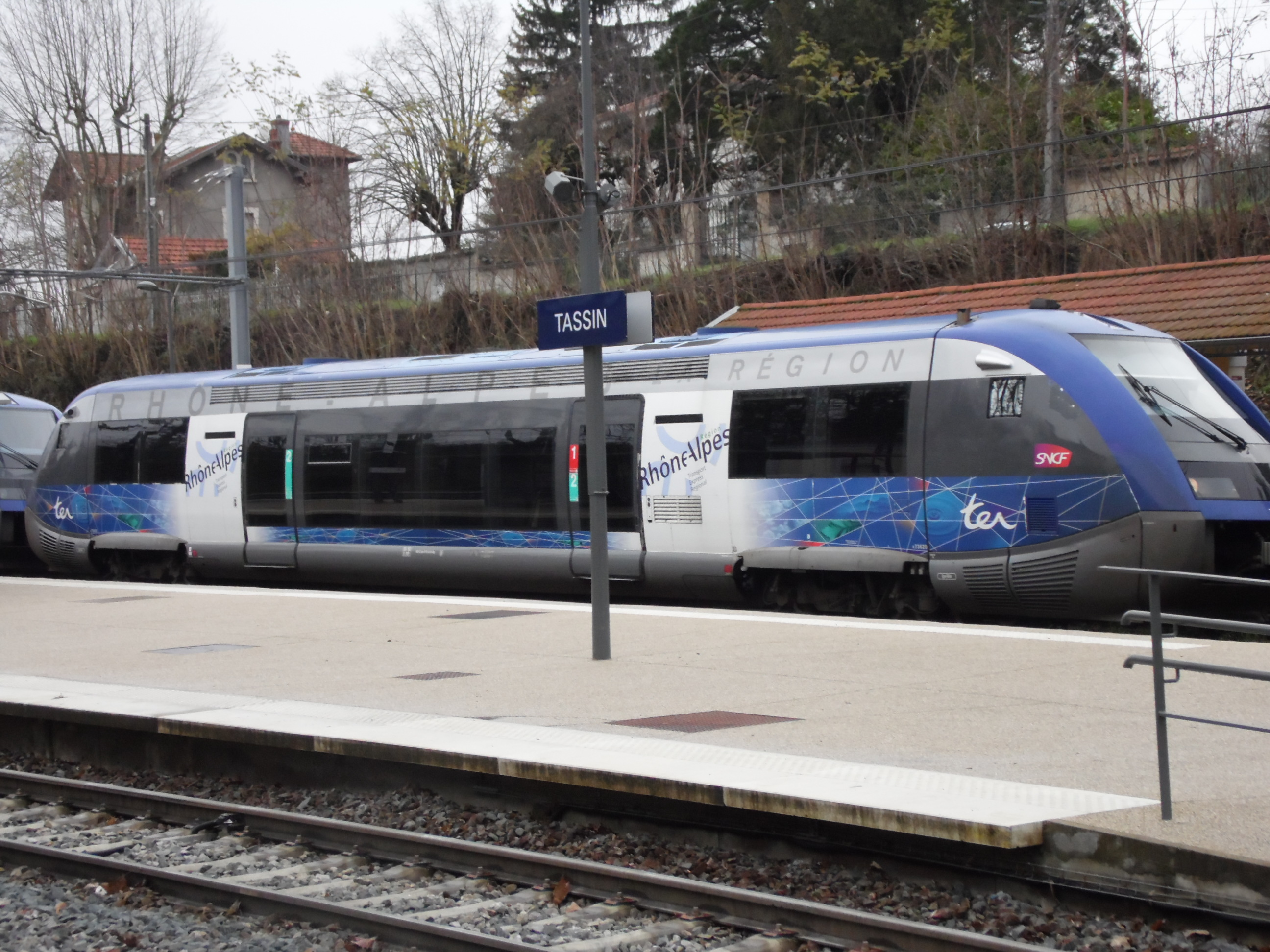 Automotrice X 73620 de la SNCF, arborant l'ancienne livrée TER Rhône-Alpes, en gare de Tassin.